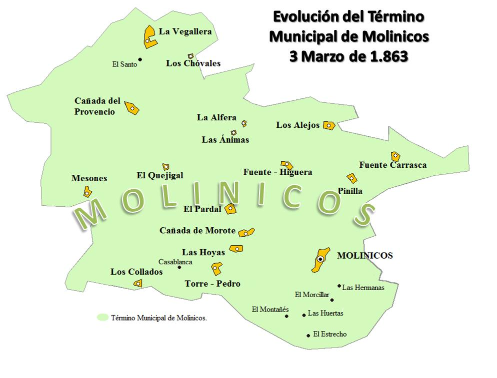 Mapa completo del Término Municipal de Molinicos tras la evolución desde su emancipación en 1846